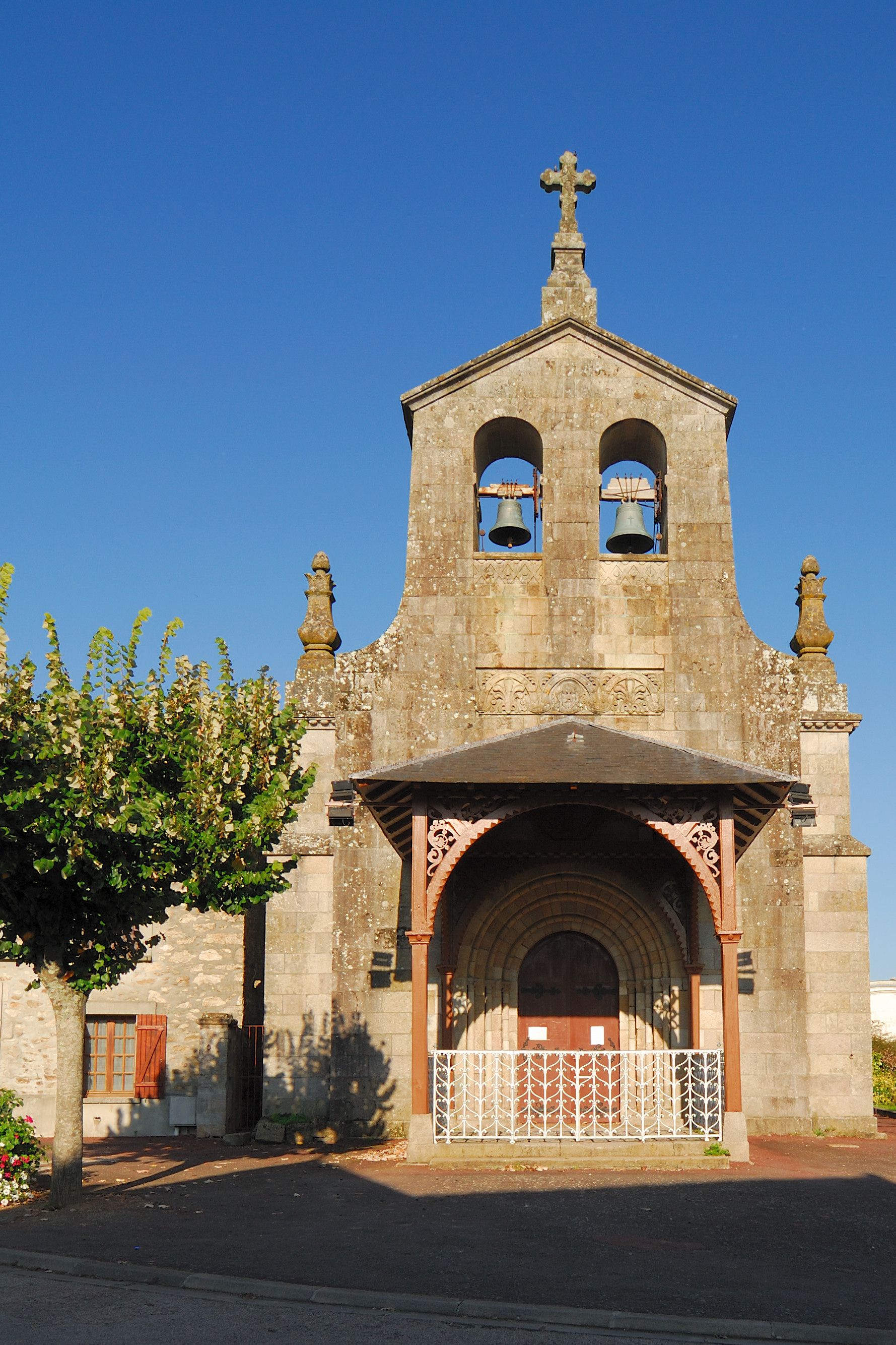 Eglise de la commune de condat